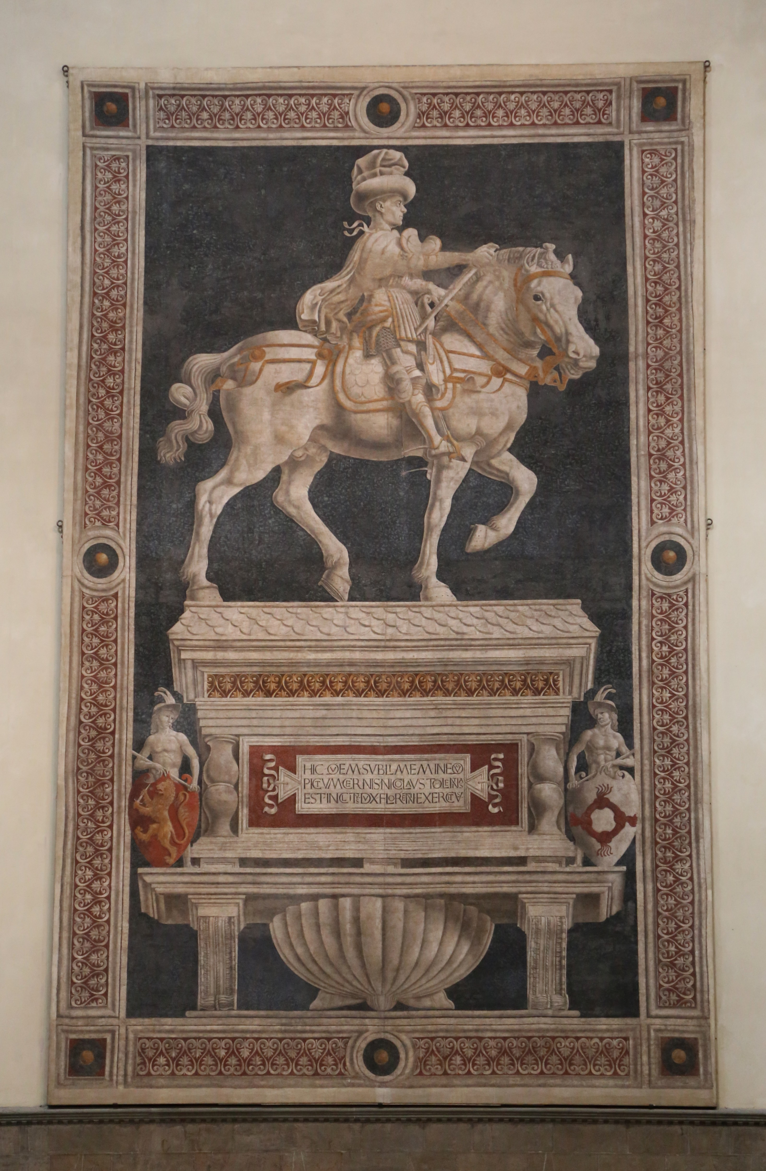 Andrea del Castagno: Fresco Niccolo da Tolentino, Santa Maria del Fiore, Florenz